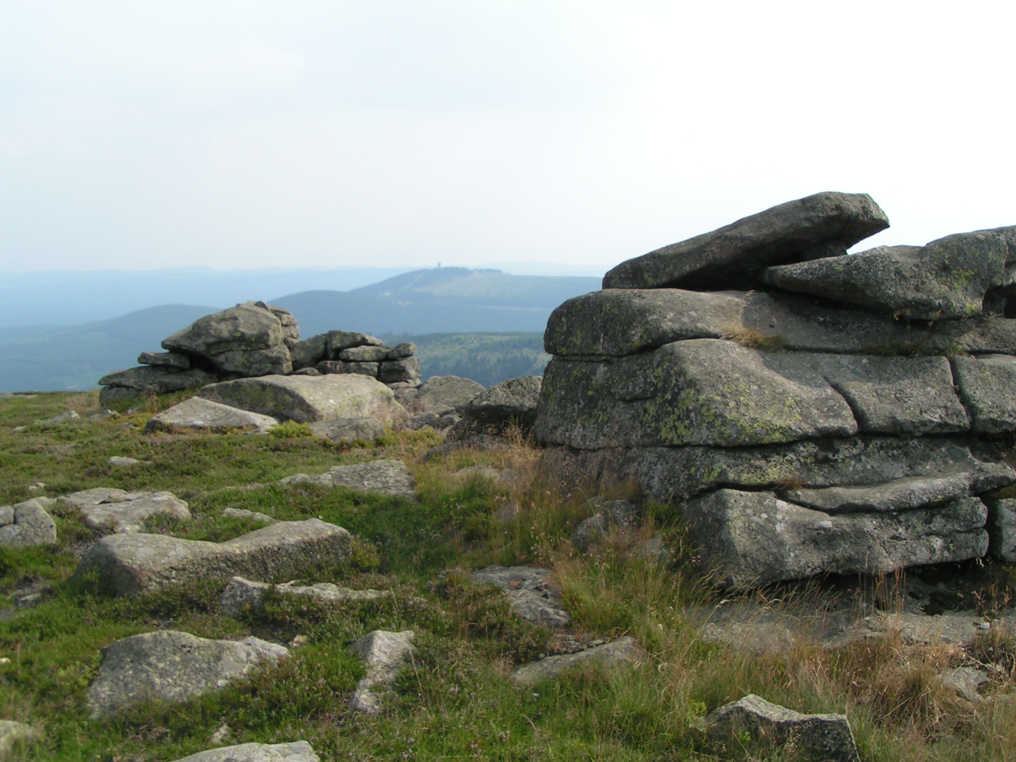 Granitstücke auf dem Brocken. Links Hexenaltar und rechts Teufelskanzel.